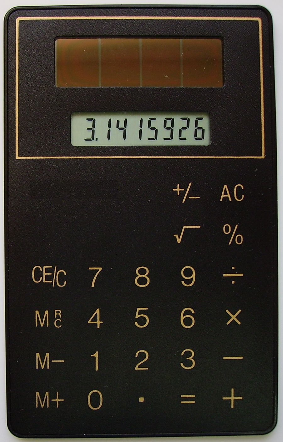 Calculatrice solaire extra-plate Affichage par cristaux liquides à 8 chiffres Source d'alimentation : cellule photovoltaïque incorporée Format type « carte de paiement » Dimensions : 86 × 54 × 2,5 mm Masse : 14,3 g Années 1980 Note : offerte dans le passé pour tout abonnement à un hebdomadaire.